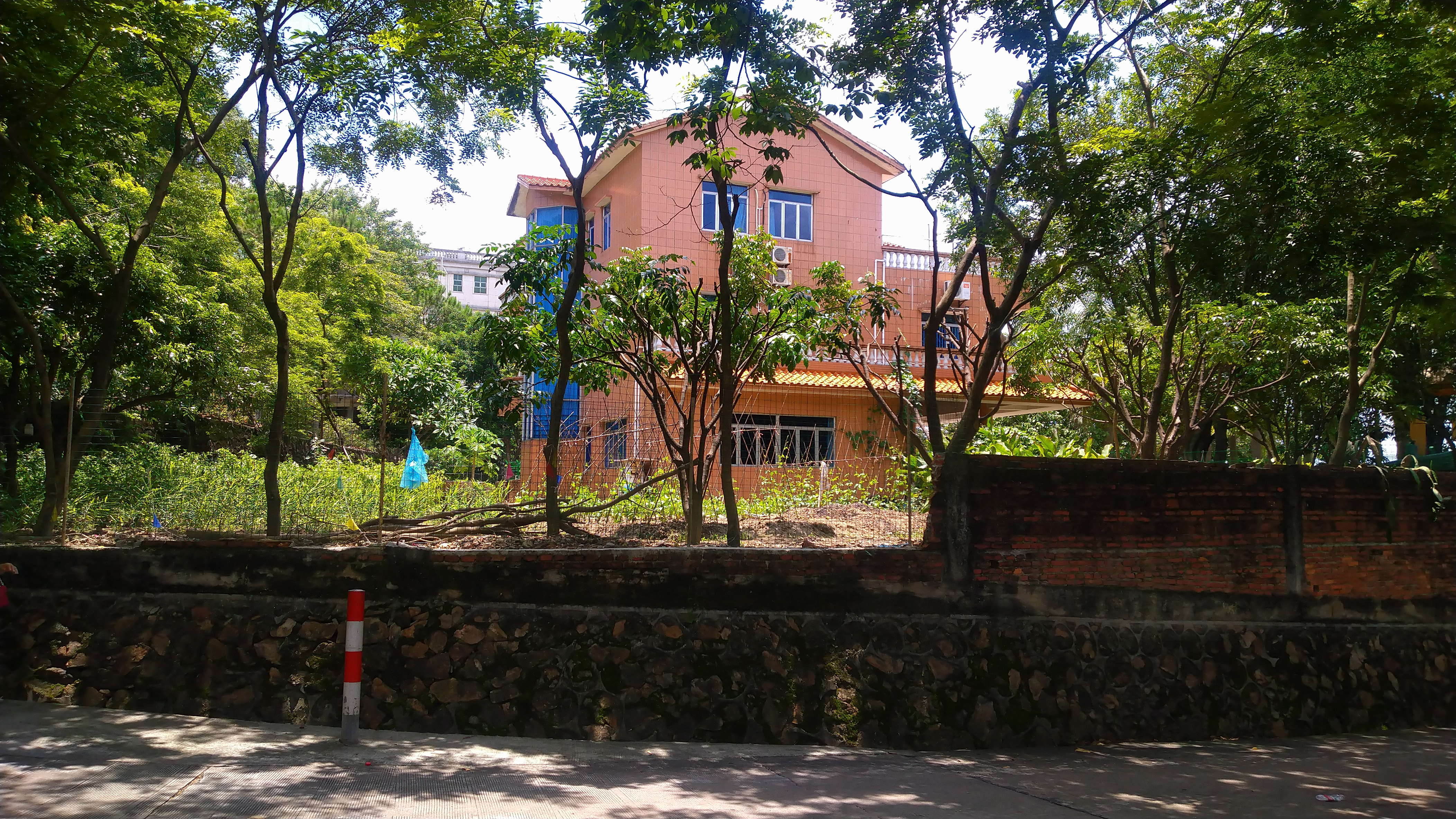 广东观音山森林公园周围私人搭建的别墅